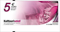 kulttuuriseteli kuva